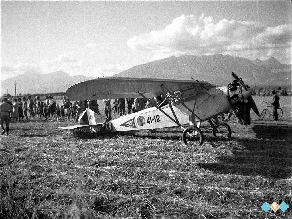 Pristanek letala na Mengeškem polju.